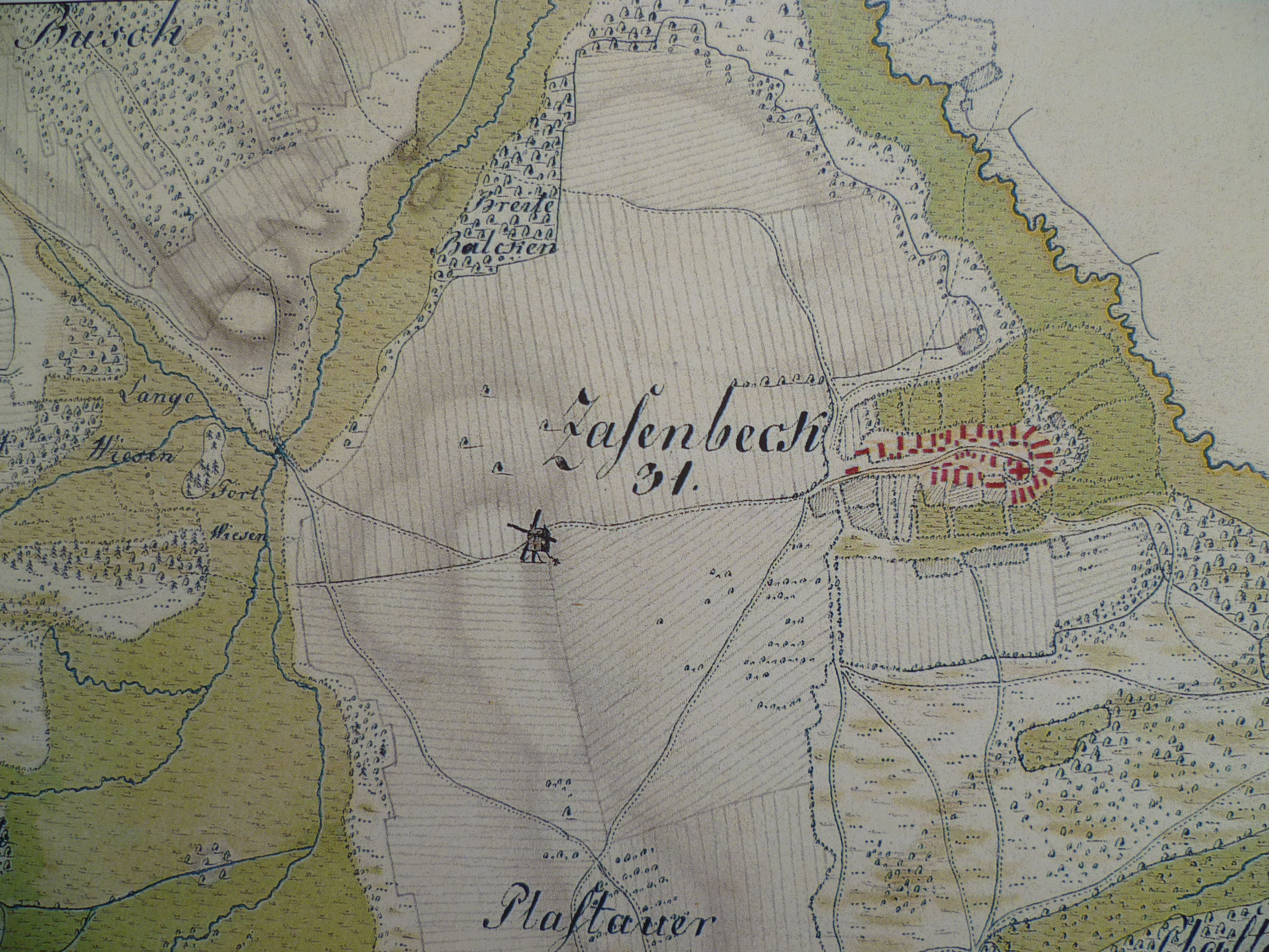 Fotoausschnitt aus der Kurhannoverschen Landesaufnahme von 1779